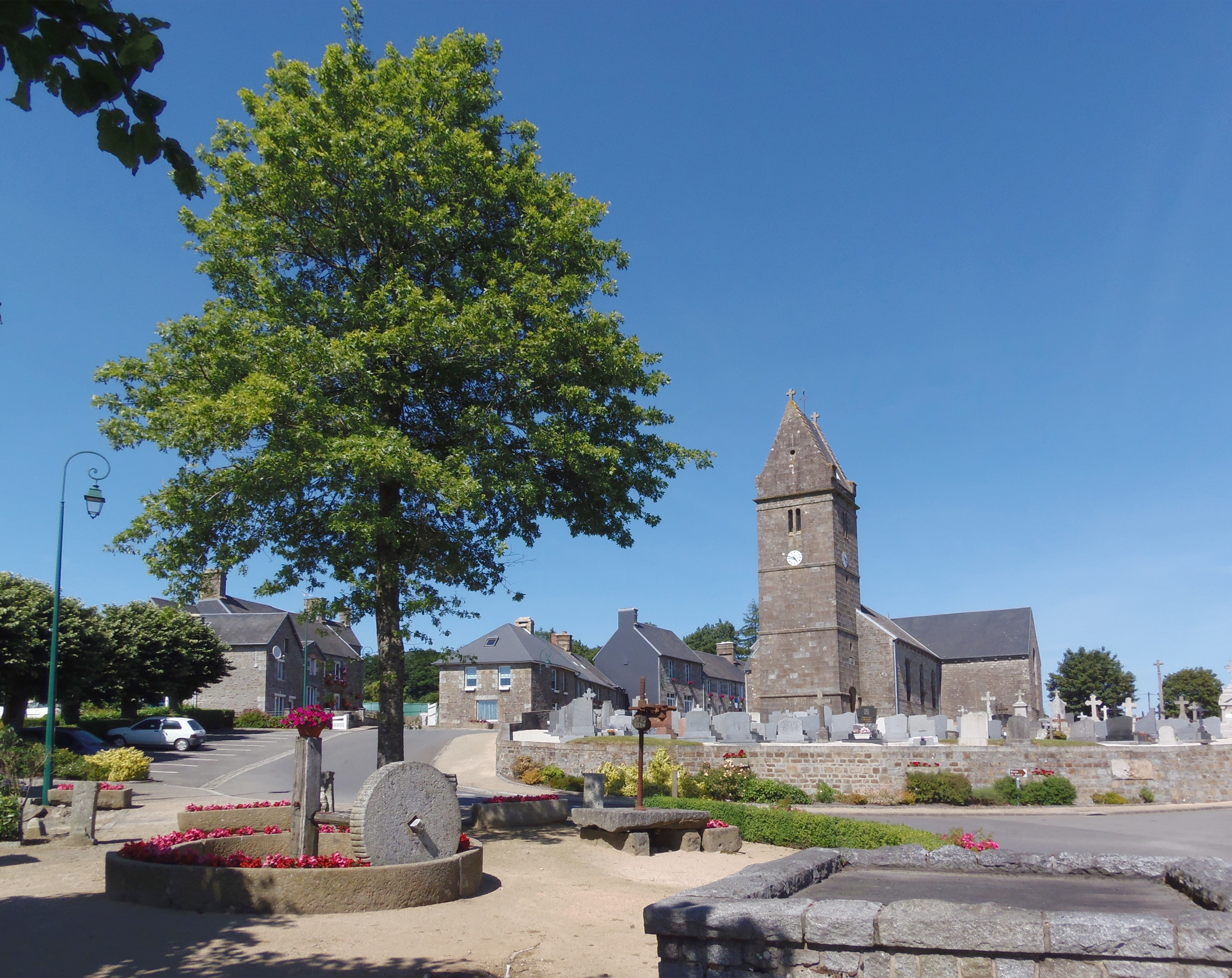 Saint-Michel-de-Montjoie (Normandie, France). Vue du bourg et de l'église Saint-Michel.